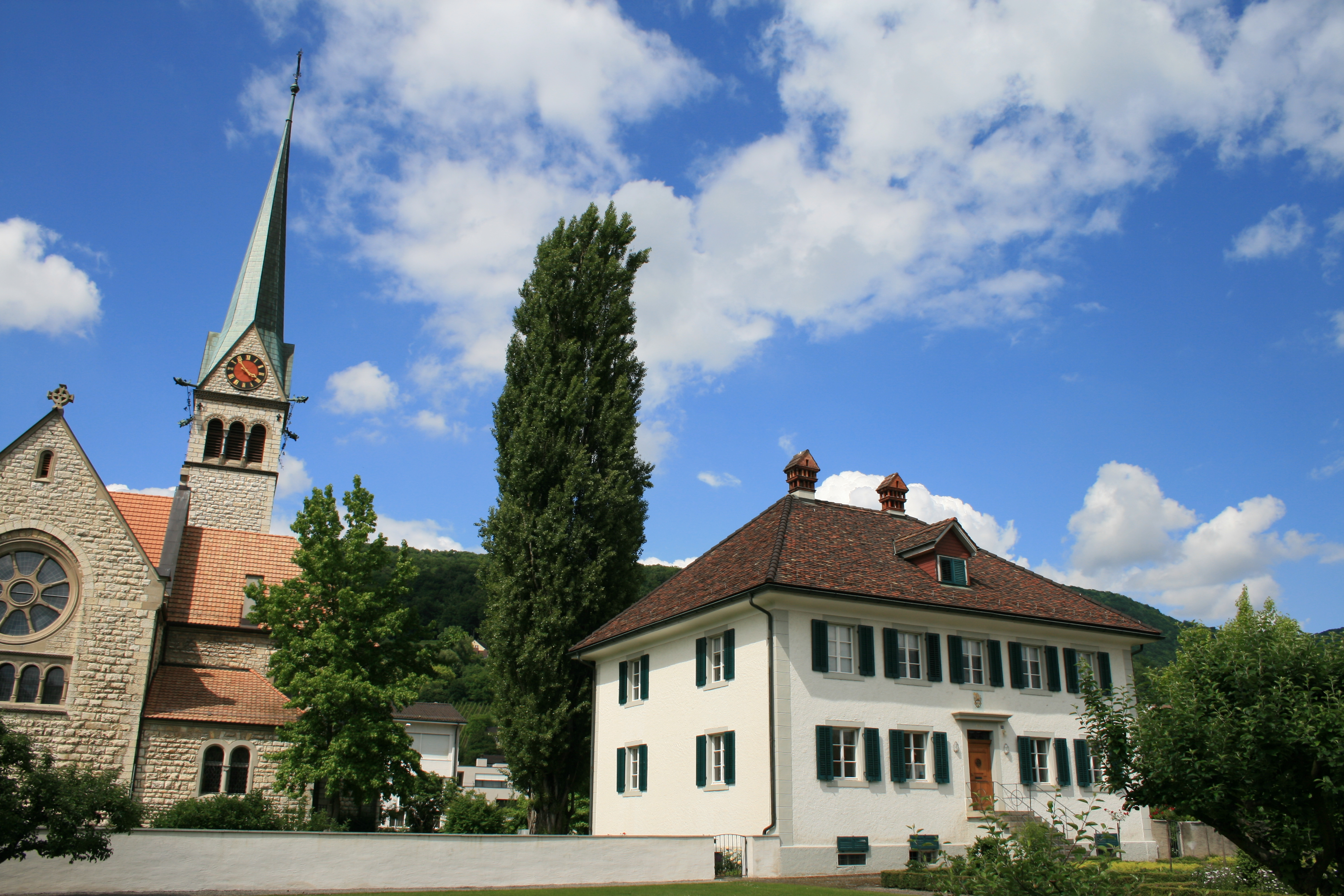 Pfarrhaus und Kirche St. Sebastian